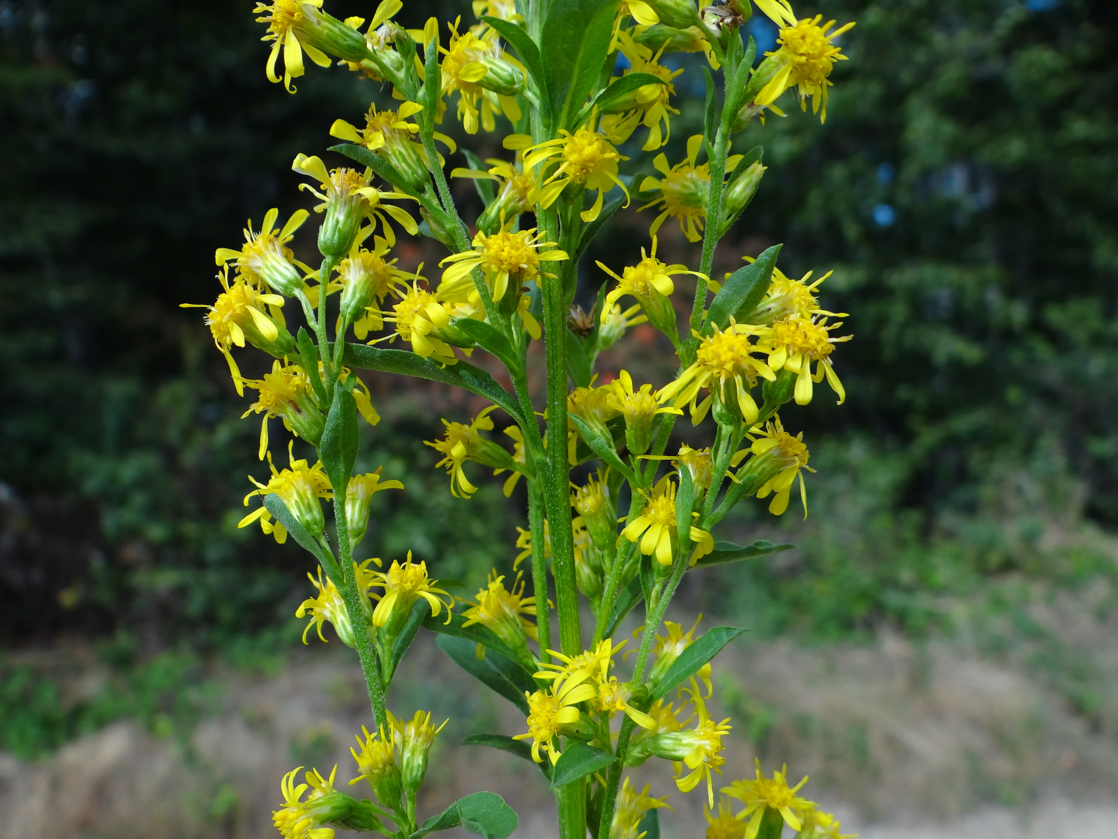 Solidago virgaurea (location: Poland, Beskid Wyspowy, Białowodzka Góra)